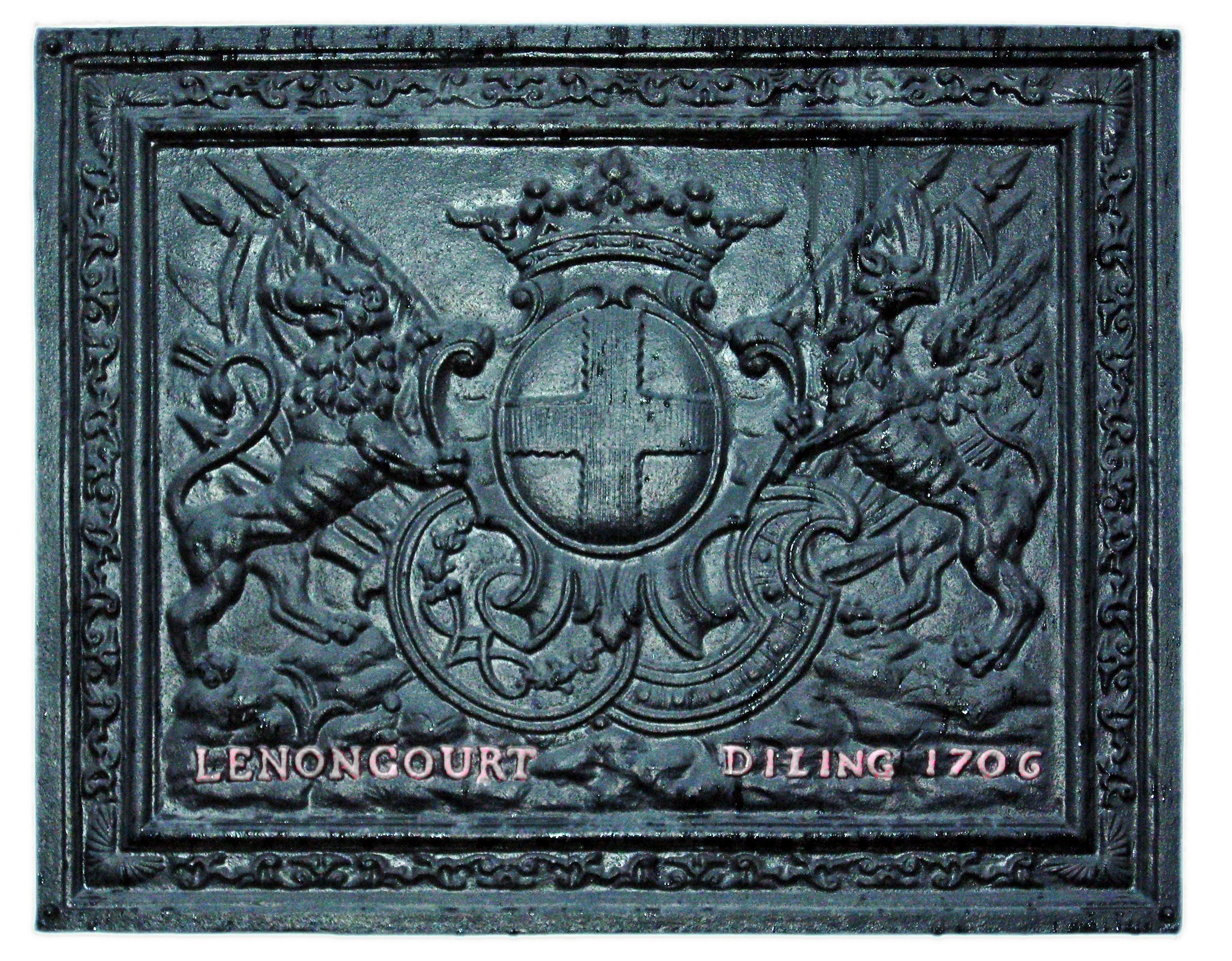 Takenplatte war ein Produkt Dillinger Hütte. Das Lenoncourtsche Wappen war Vorlage für das Firmensymbol